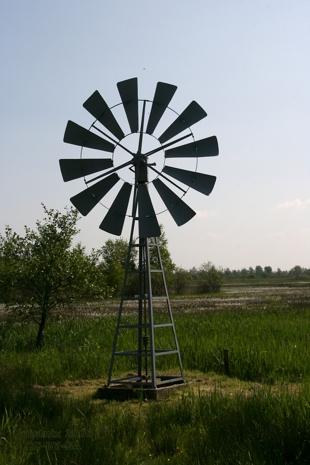 Nijetrijne: Windmotor nr 6